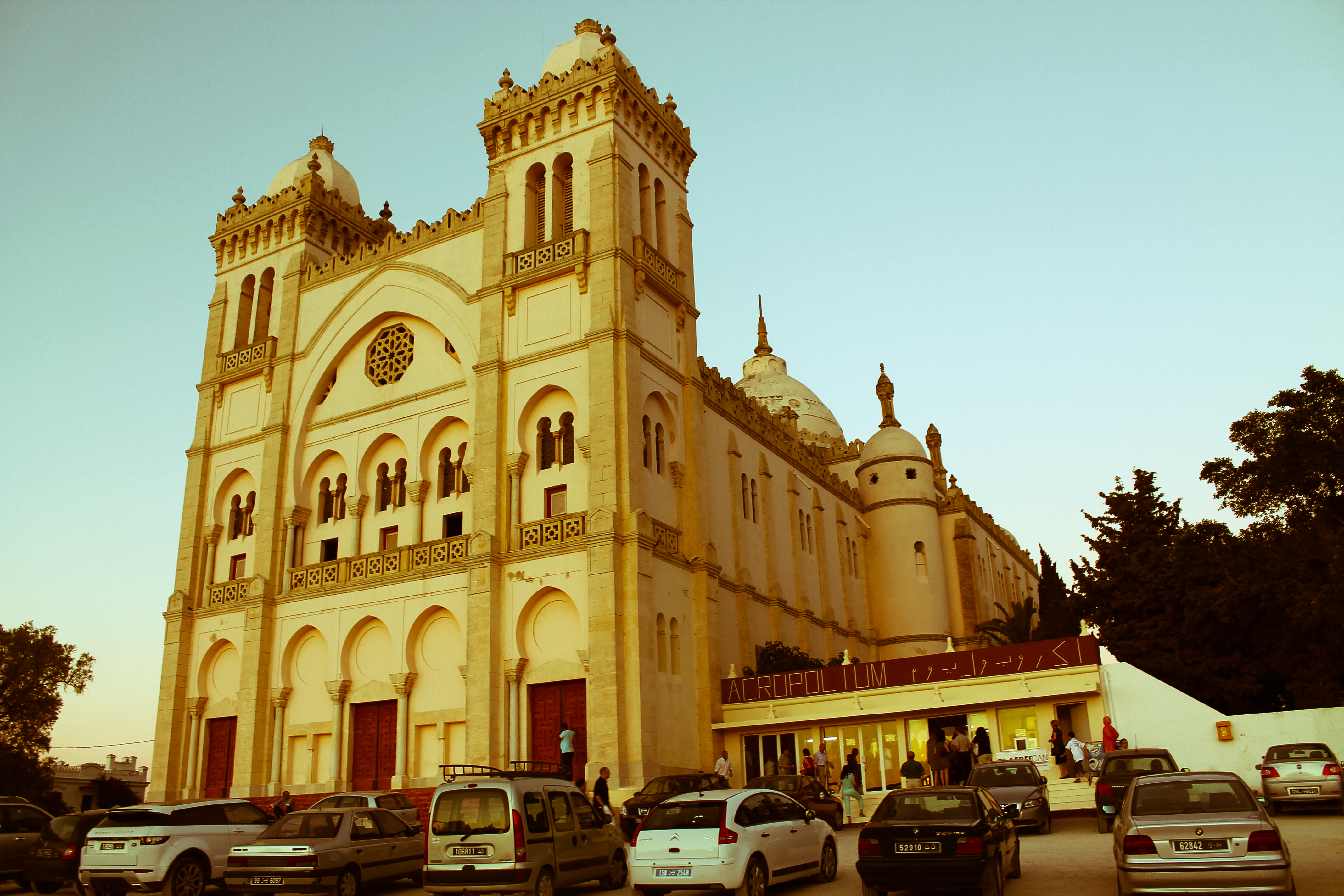 Acropolium de Carthage: Cathédrale Saint-Louis de Carthage